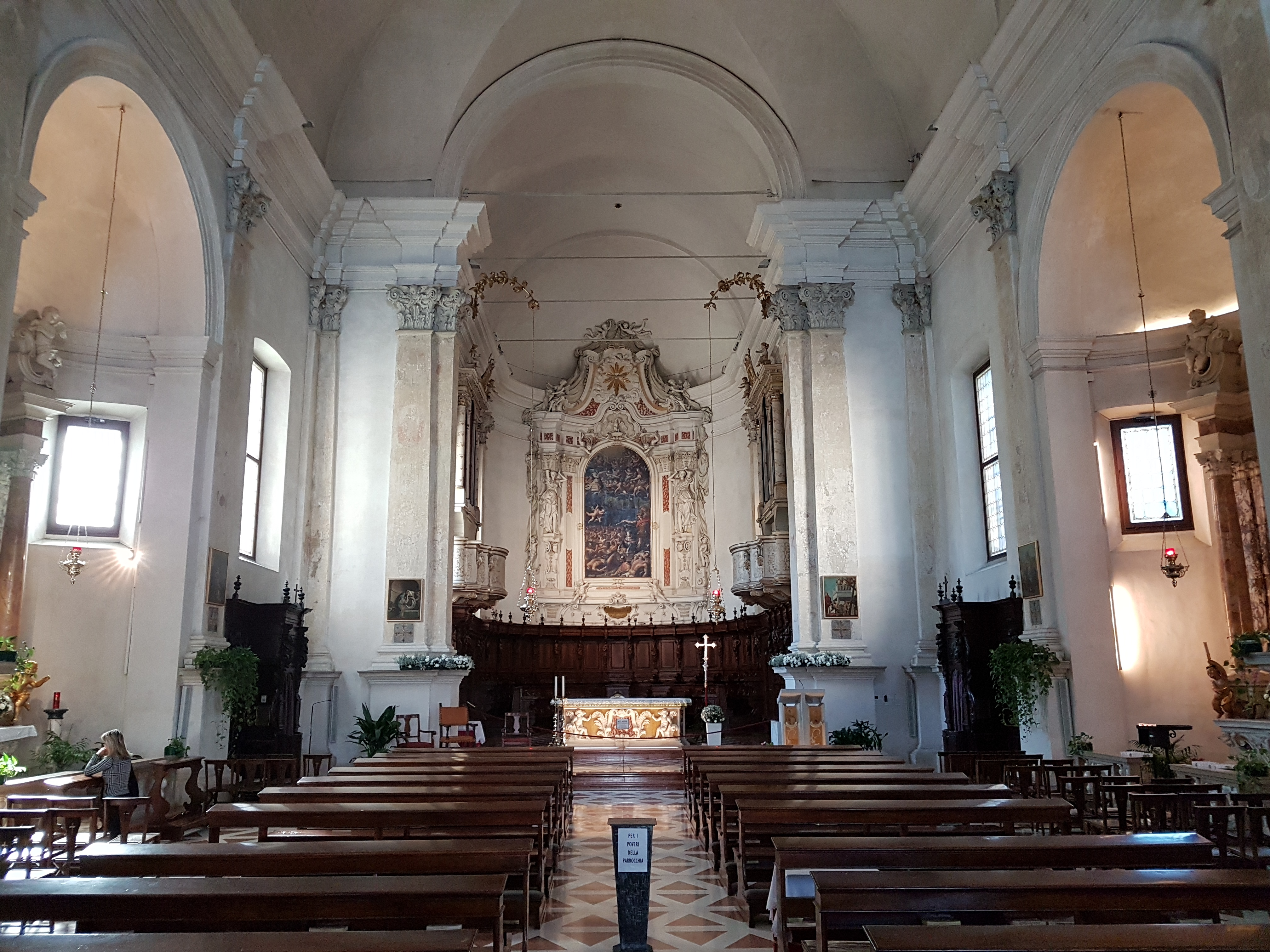 Chiesa di Sant'Agnese (Treviso)